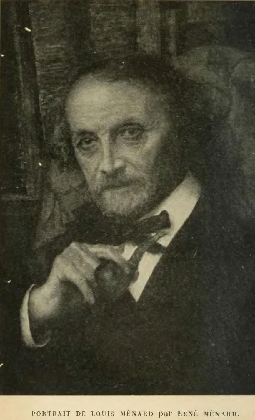 Portrait de Louis Ménard. (Reproduction du tableau de René Ménard).